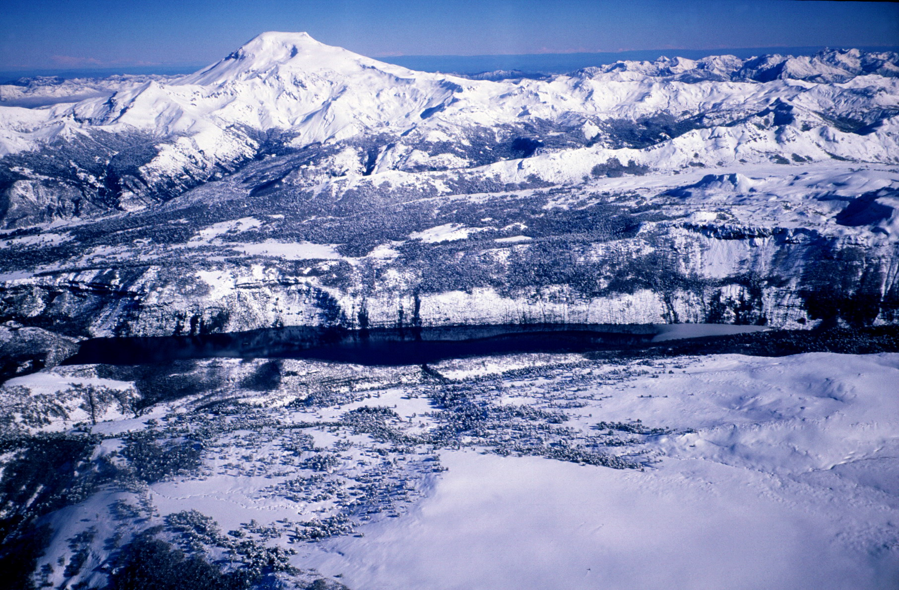 Volcán Callaqui y Laguna El Barco, ChileVolcán Callaqui y Laguna El Barco